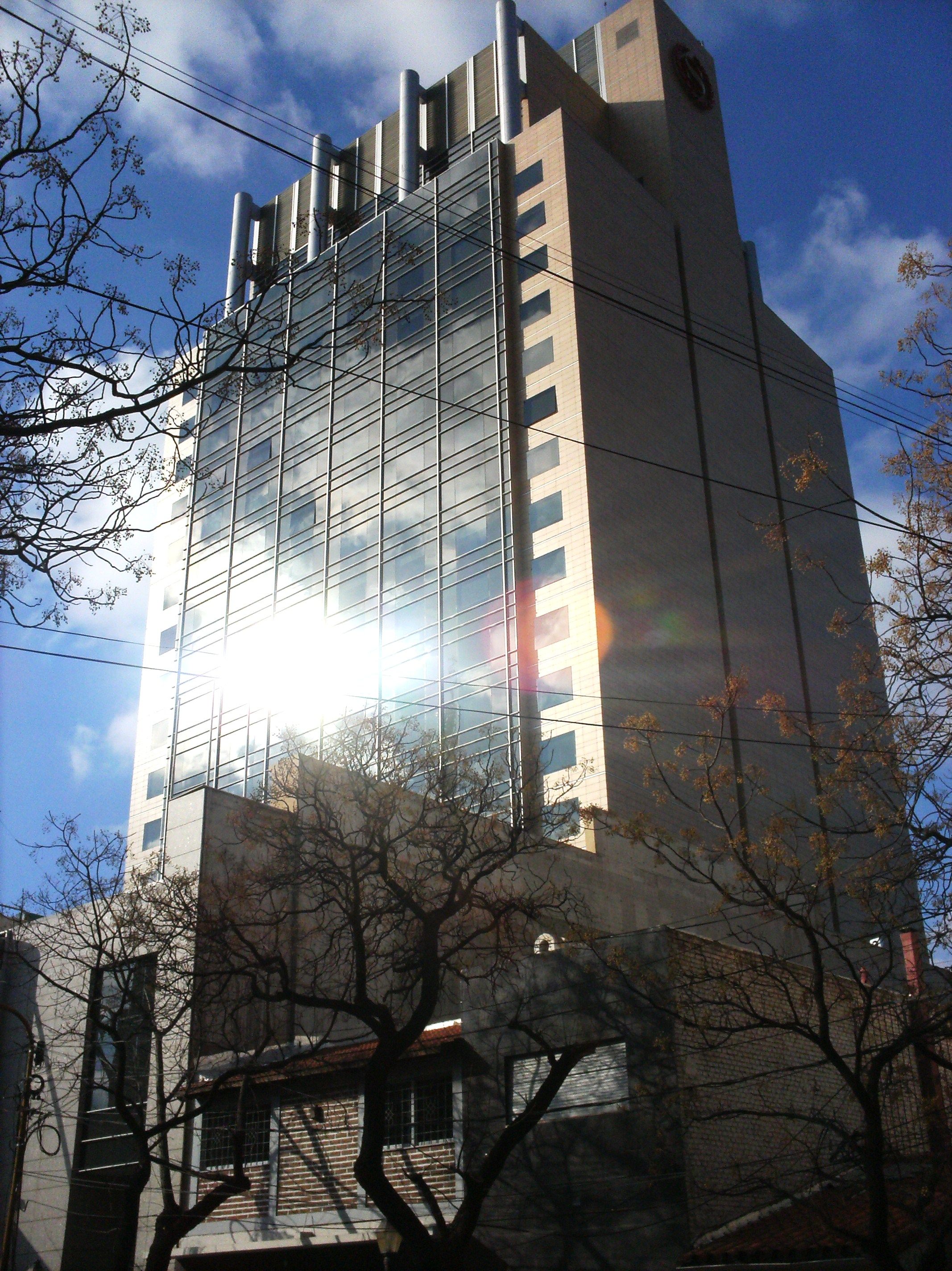 El Sheraton de Mendoza, la torre más alta de la ciudad.